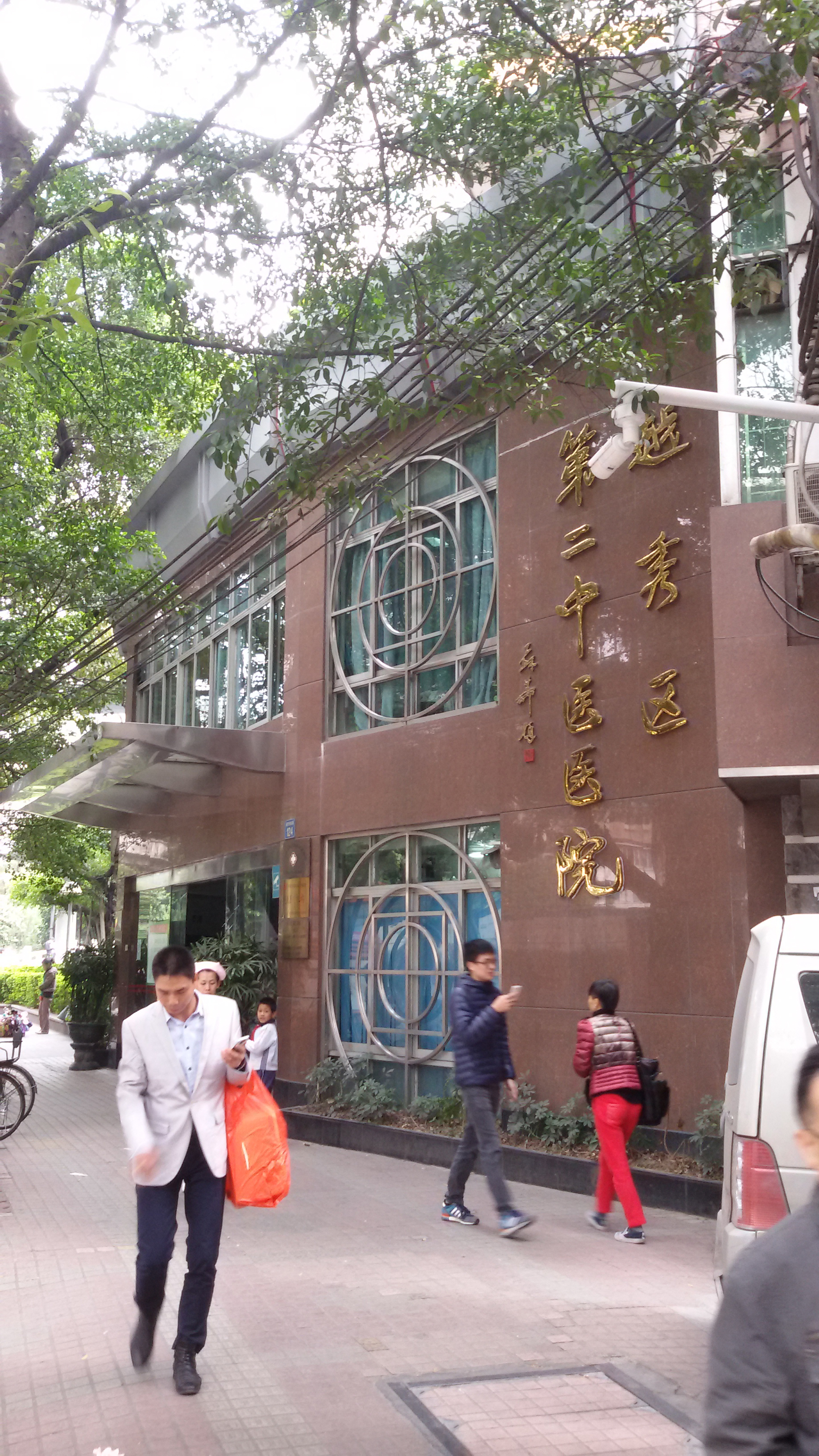 粵語: 越秀區第二中醫院